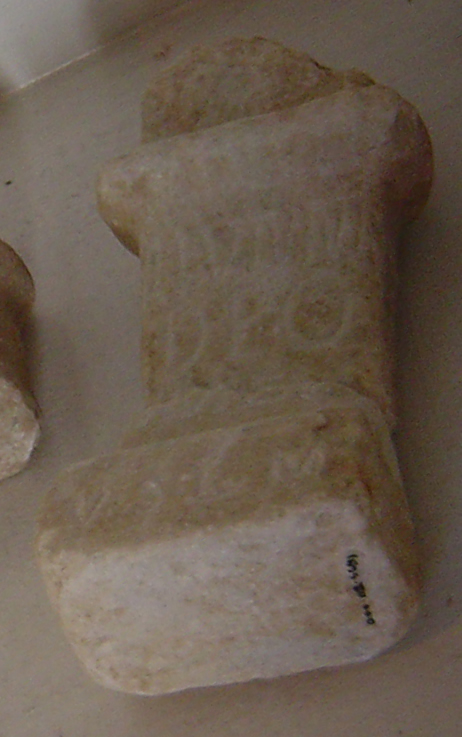 Iluni Jainkoaren aldarea.